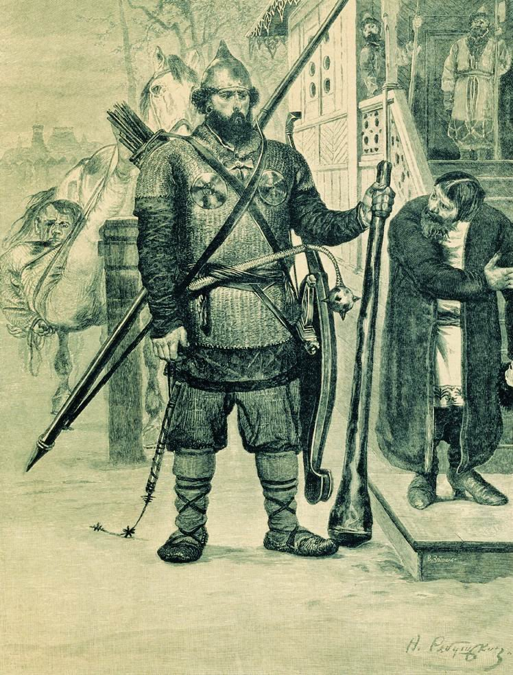 Илья Муромец. 1895. Иллюстрация к книге "Русские былинные богатыри"